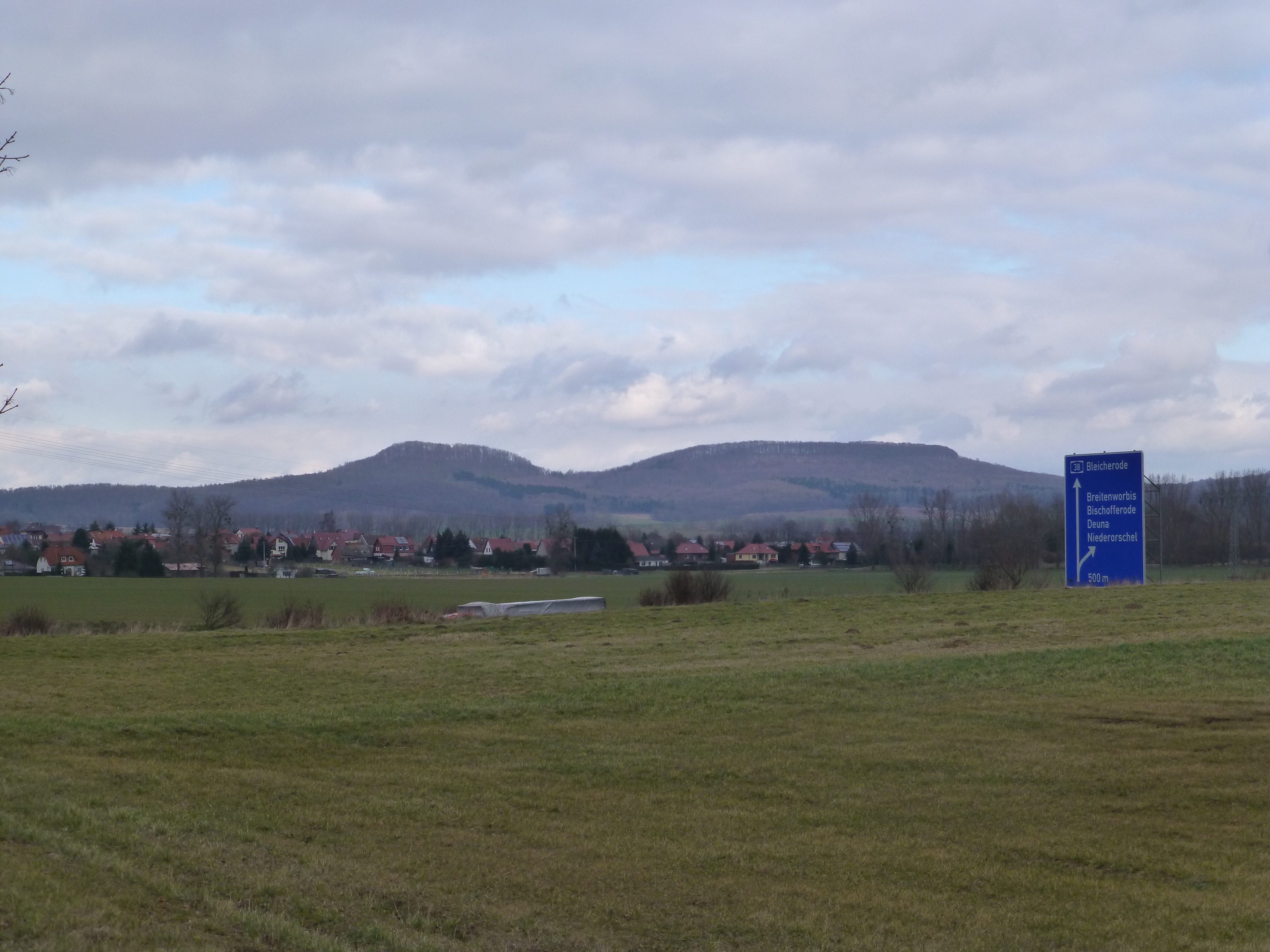 Blick von der A 38 zum Hubenberg (re) und Haarburg (li)